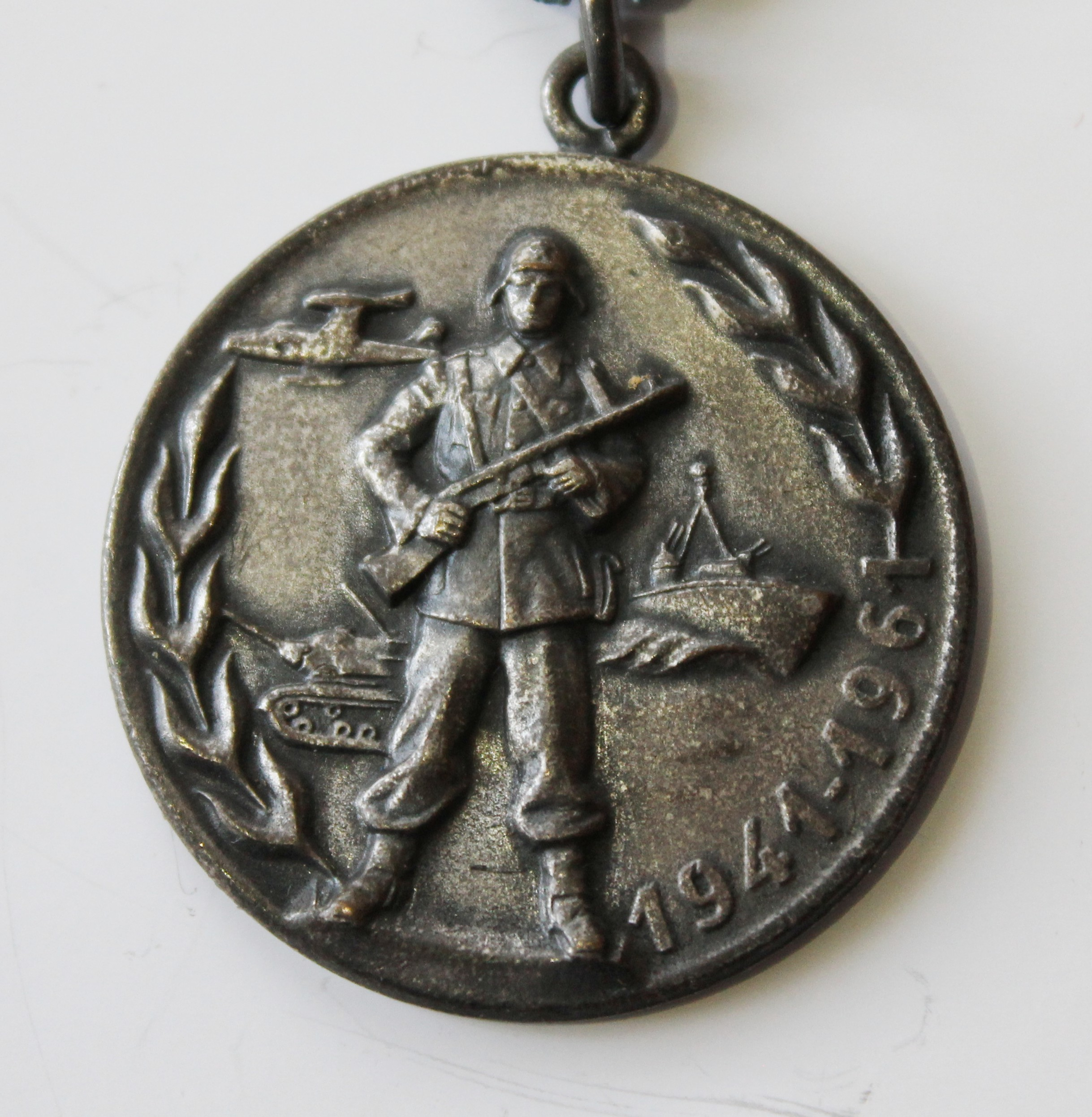 Спомен-медаља поводом двадестогодишњице ЈНА, 1961. година (предња страна)